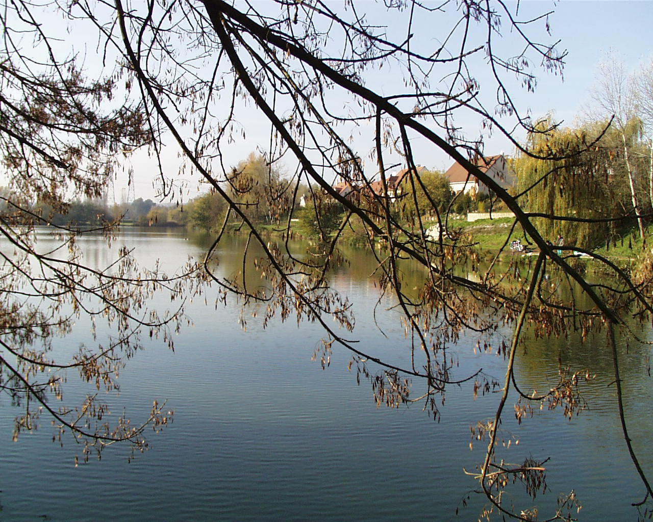 Photographie de l'étang du Gué situé à Marcoussis (Essonne), prise par Belgavox, en novembre fr:1999.